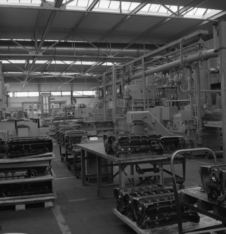 Autowerk BMW-München Information added by Wikimedia users.Motorblöcke Sechszylinder-Reihenmotoren BMW M30 für BMW E3 und BMW E9